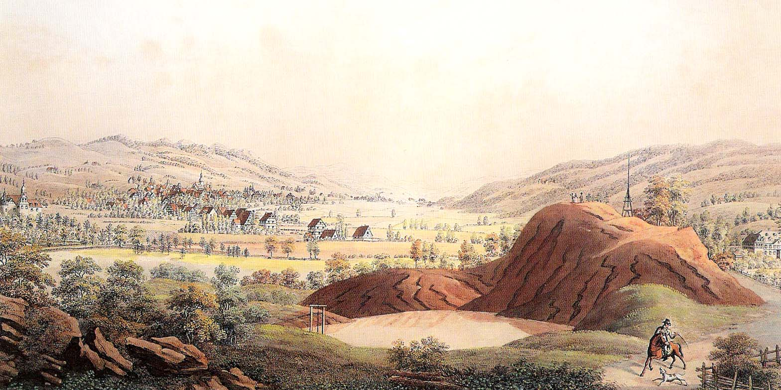 Die Roten Berge (32 × 47 cm, gouachierte Umrissradierung auf Papier) – Dargestellt ist eine Ansicht der Stadt Schwelm von Osten her. Im Vordergrund ist die die Abraumhalde des Bergwerks Rodenfeld zu sehen. Am linken Bildrand liegt das Haus Martfeld, am rechten das Haus Friedrichsbad.